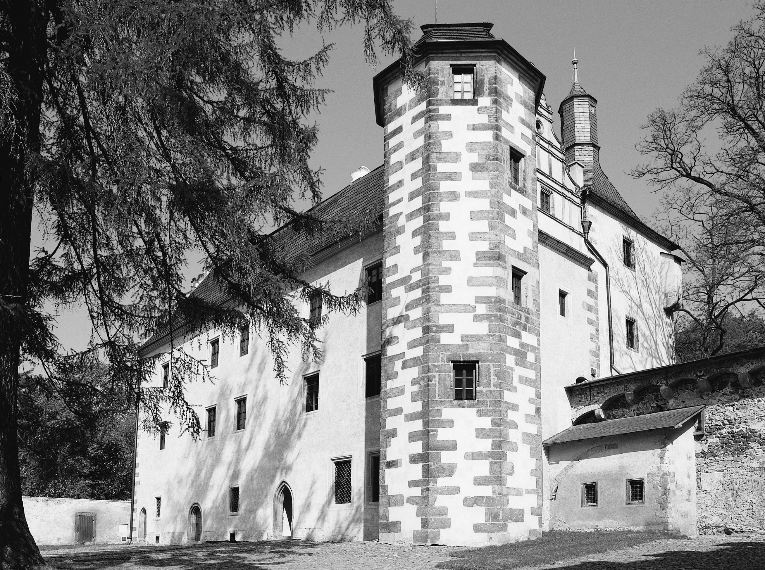 Pohled na jihovýchodní průčelí horního zámku